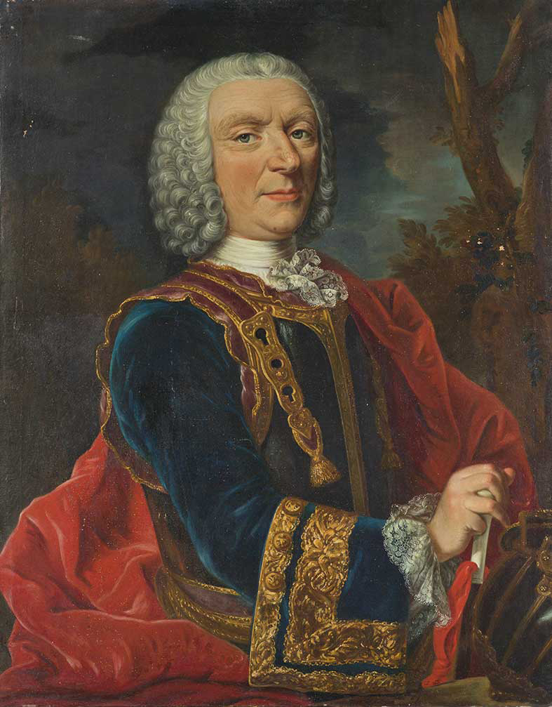 Ritratto del conte Francesco Amedeo Salmatoris.